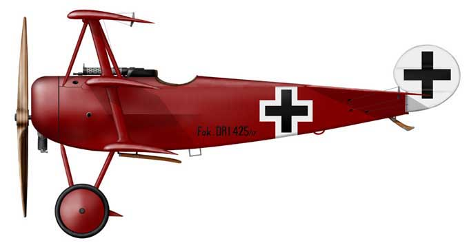 Fokker Dr.I_Richthofen_425/17